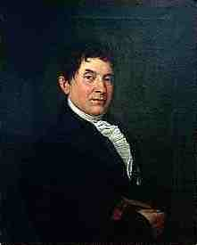 zeitgenössisches Gemälde: Porträt des Buchhändlers Heinrich Wilhelm Hahn (1760-1831) in Hannover